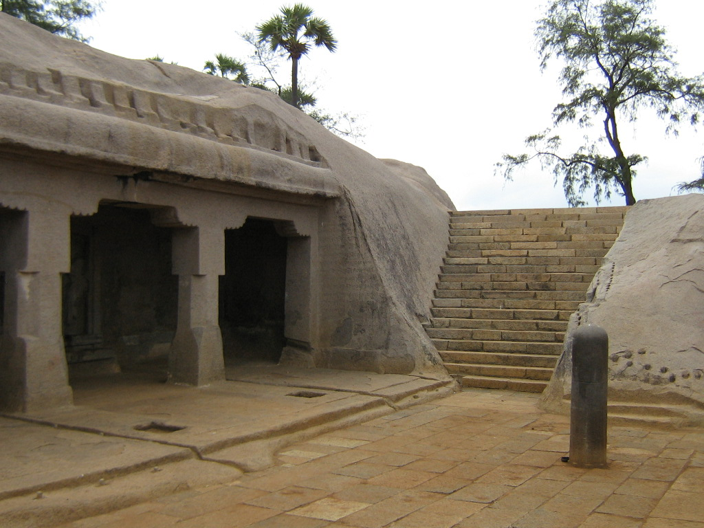 Shot by user Mayooranathan